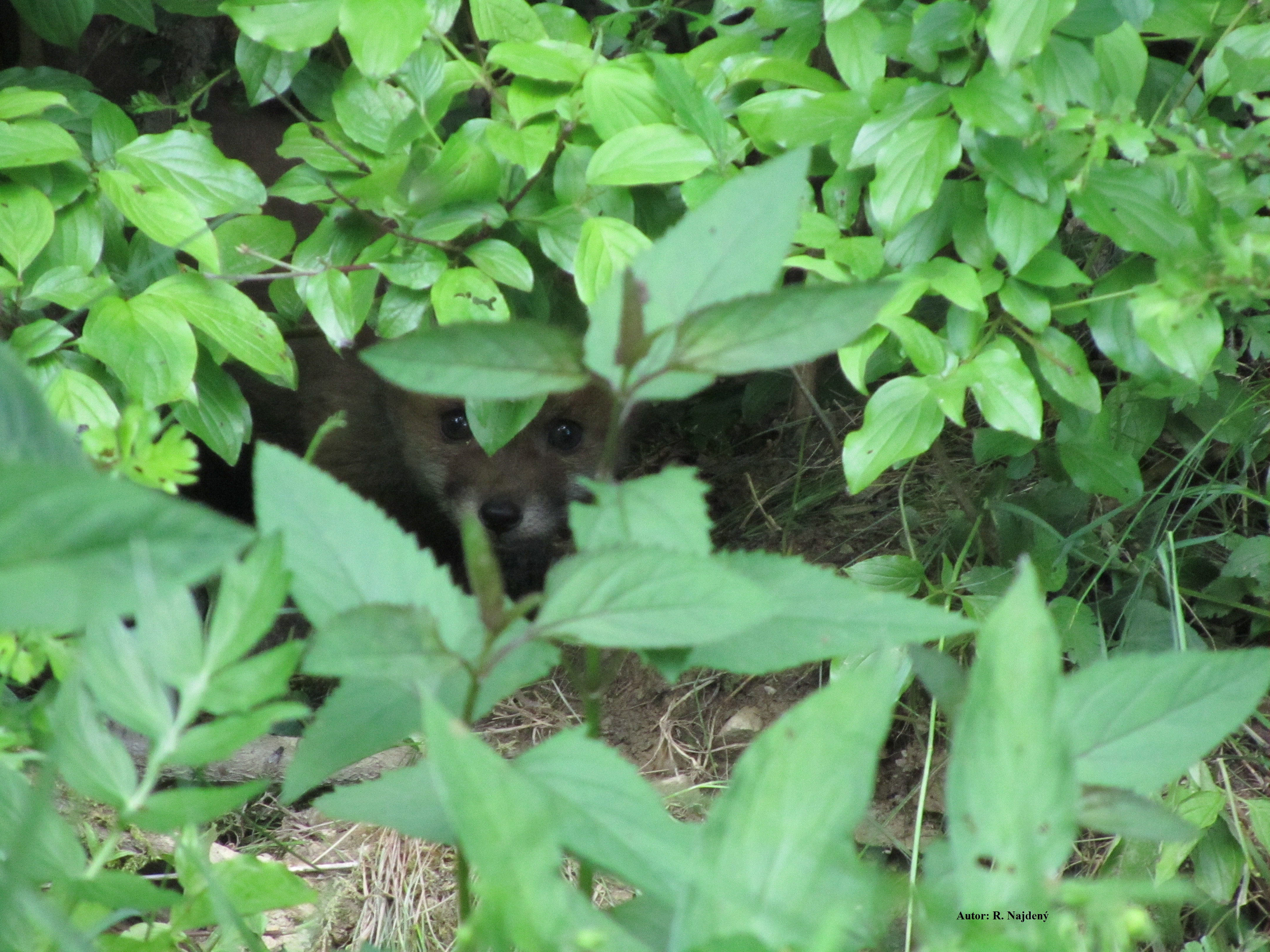 líška hrdzava nova bosaca